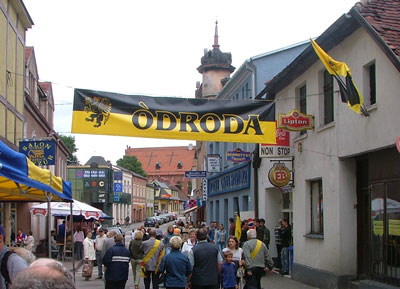 Kòscérzëna òb czas zéńdzeniegò Kaszëbów w 2004 rokù. Koscierzyna w czasie Zjazdu Kaszubów w roku 2004. Autor: Marek Kwidziński (Kaszeba on csb.wiki)